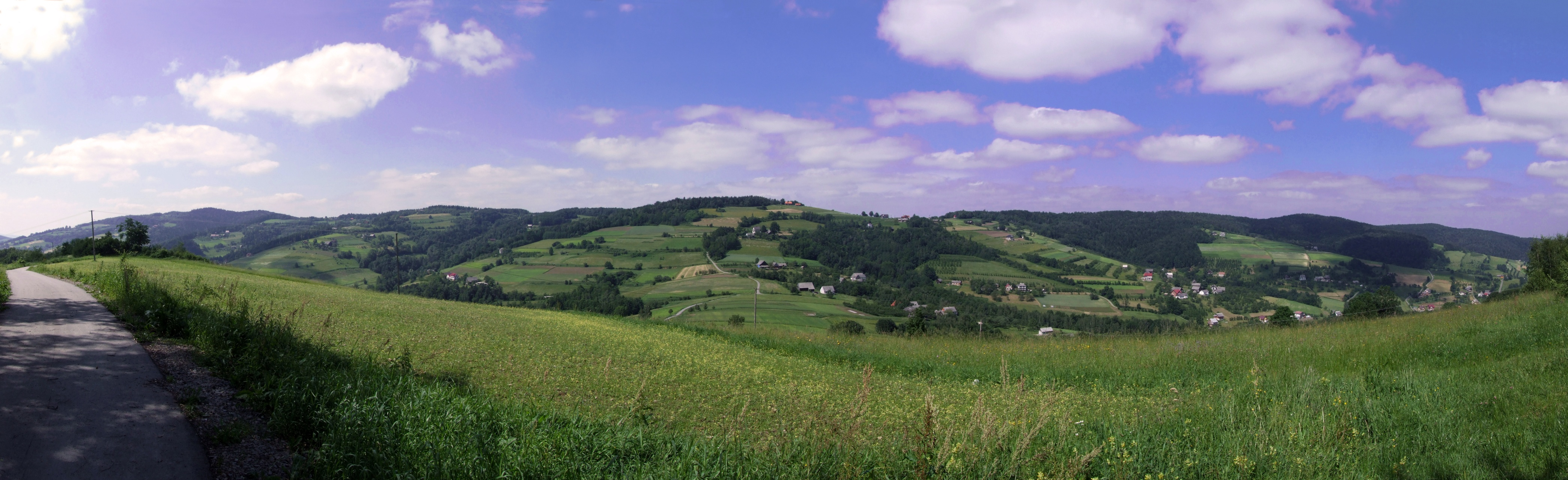 Panorama na północną stronę spod cmentarza na Jastrząbce. Widoczne jest Łopusze i jego grzbiet do Kobyły oraz dolina potoku Rozdzielec. Na grzbiecie miejscowość Rozdziele i Kamionka Mała